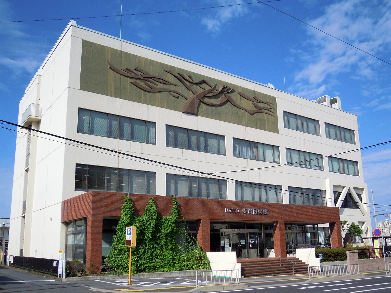 茨城県日立市ある日立市教育会館。日立市立多賀図書館が入っている。